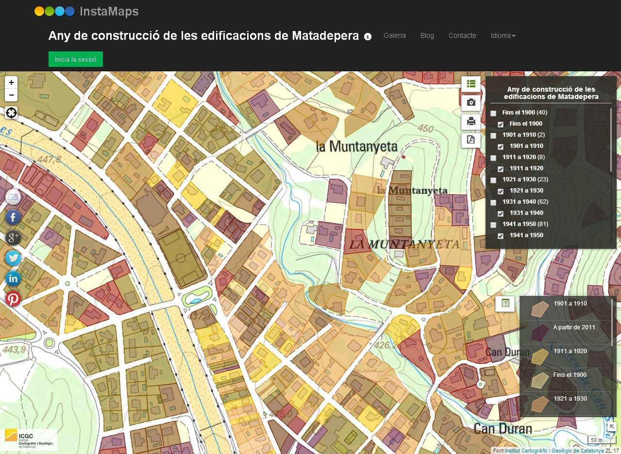 Visor d'Instamaps. ICGC